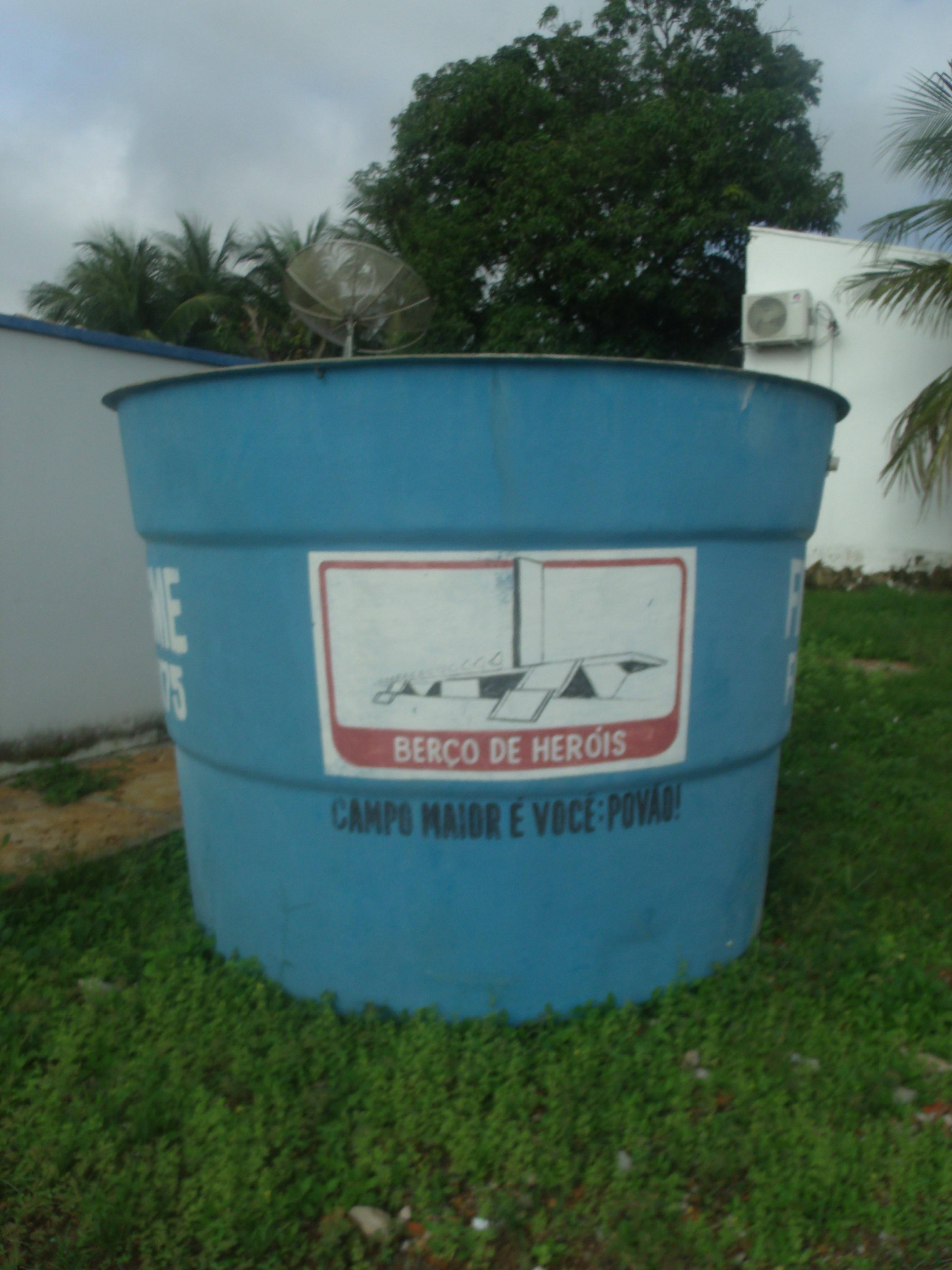 Antiga caixa dágua do SAAE usada em comunidades na zona rural e que tem o desenho do monumento nacional da Batalha do Jenipapo.Foi usada entre os anos de 2001 a 2004 na gestão de Bona Carboreto.